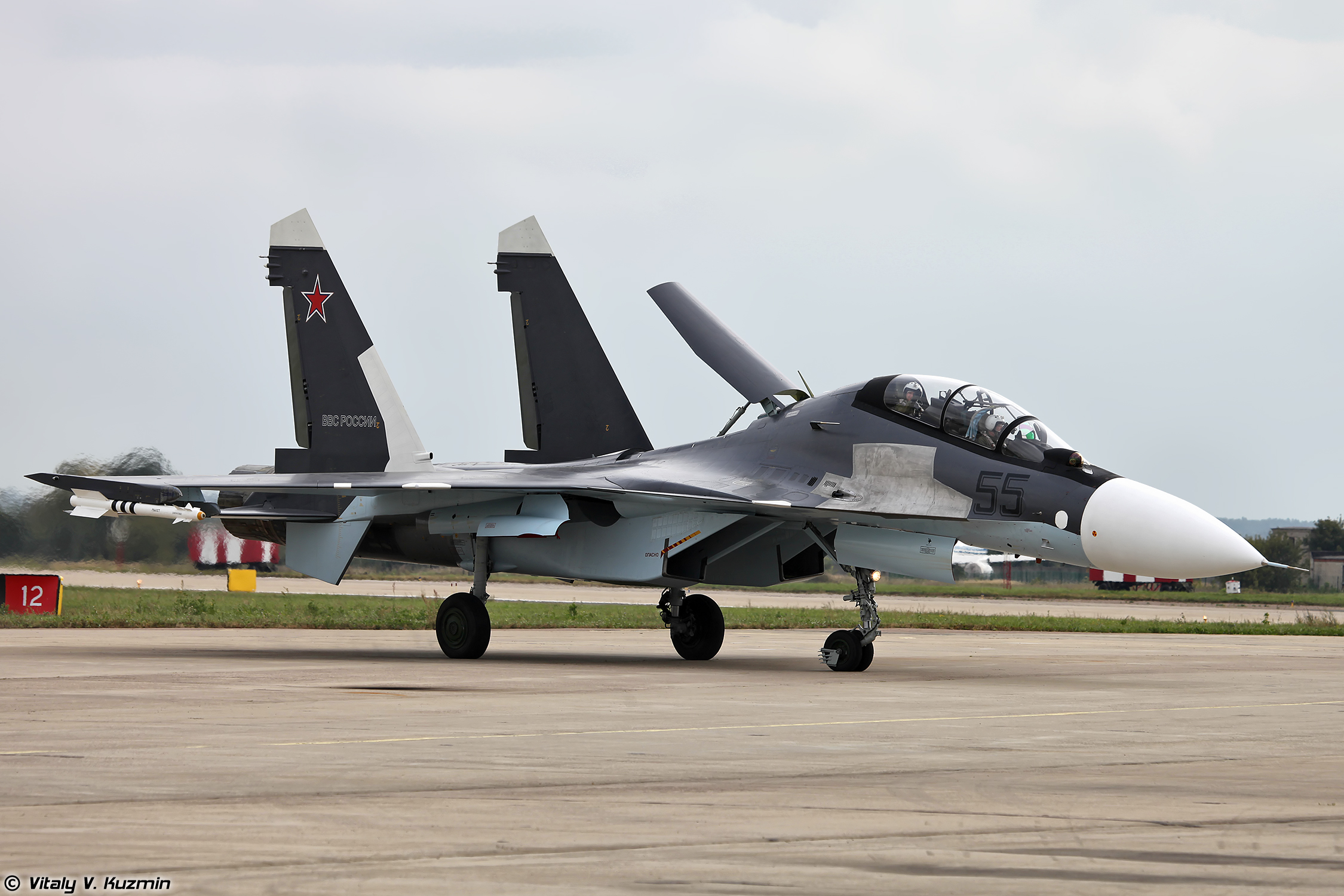 Су-30СМ (Su-30SM)